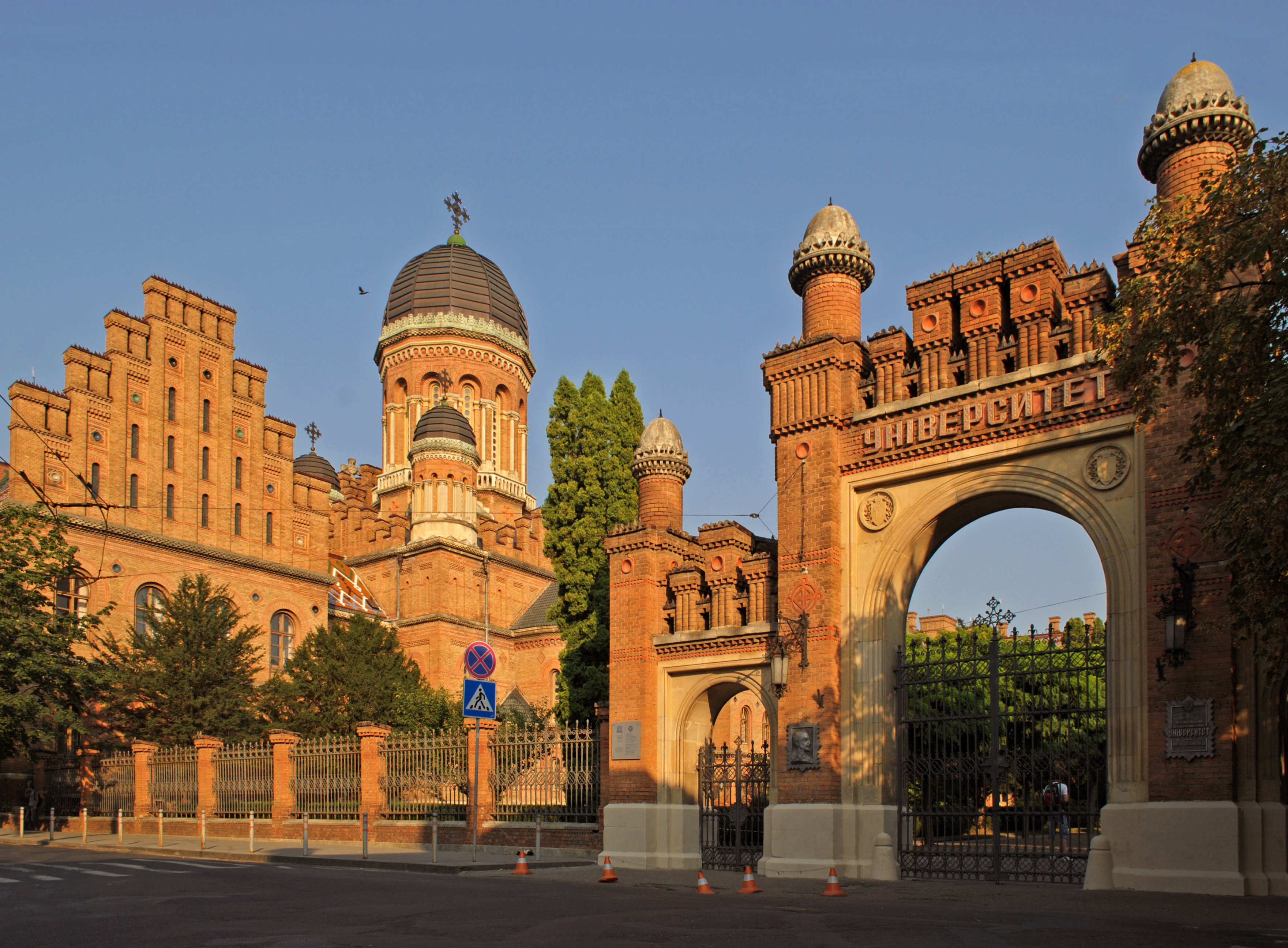 Резиденція митрополитів Буковини та Далмації, Чернівці, вул. М. Коцюбинського, 2